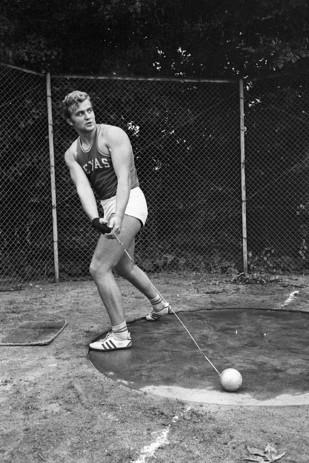 beim Training.